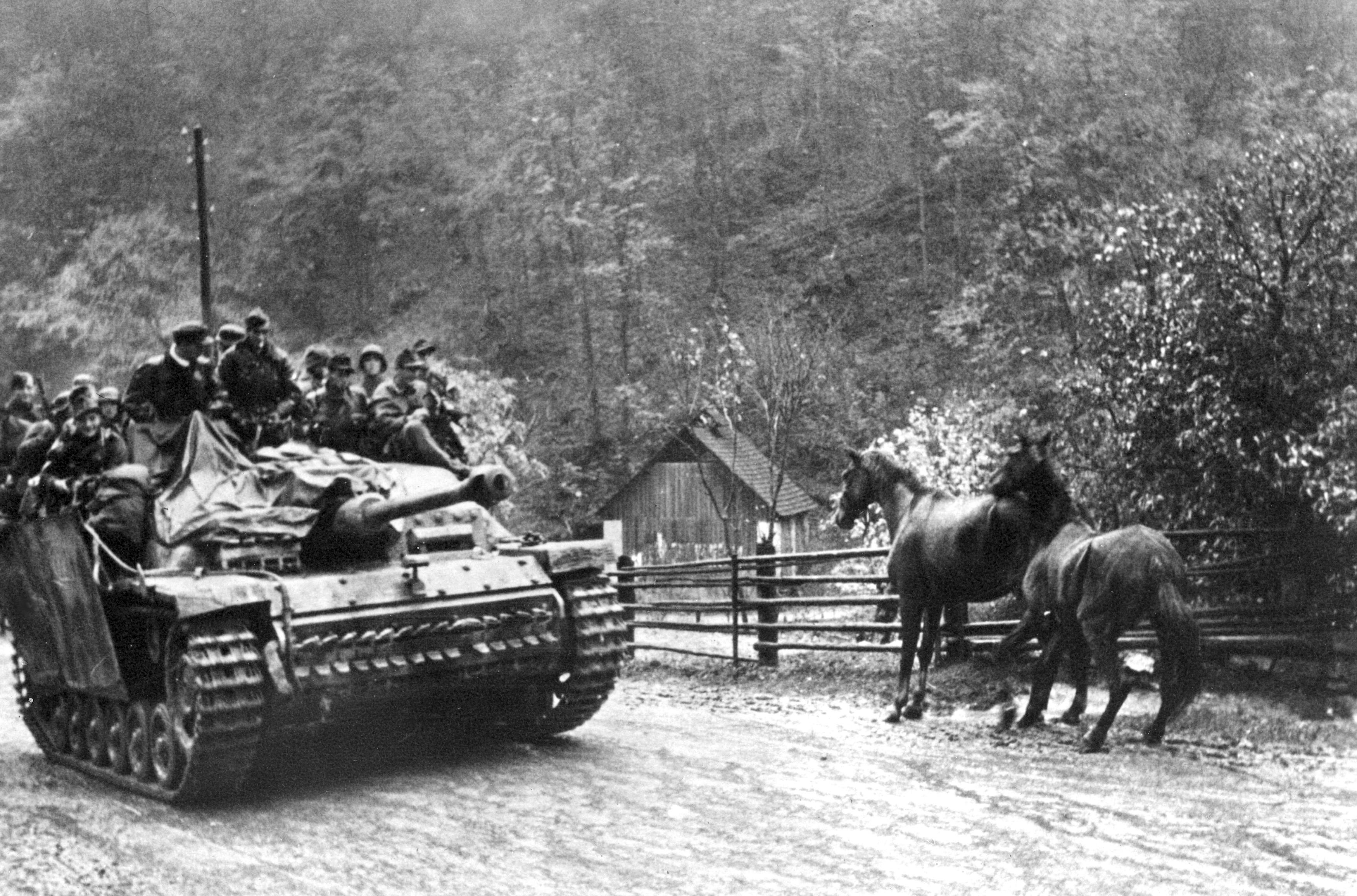 Żołnierze 18. Dywizji Grenadierów Waffen SS na dziale szturmowym StuG 40 Ausf.G w Słowacji